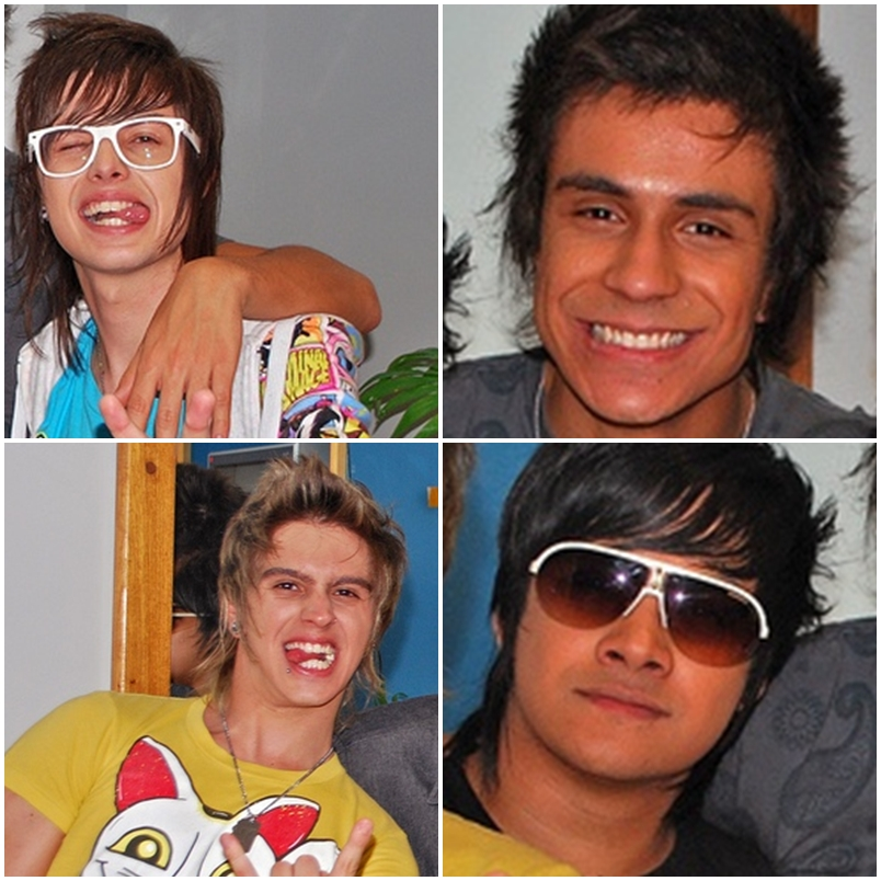 Rosto dos integrantes da banda Restart em 2010.